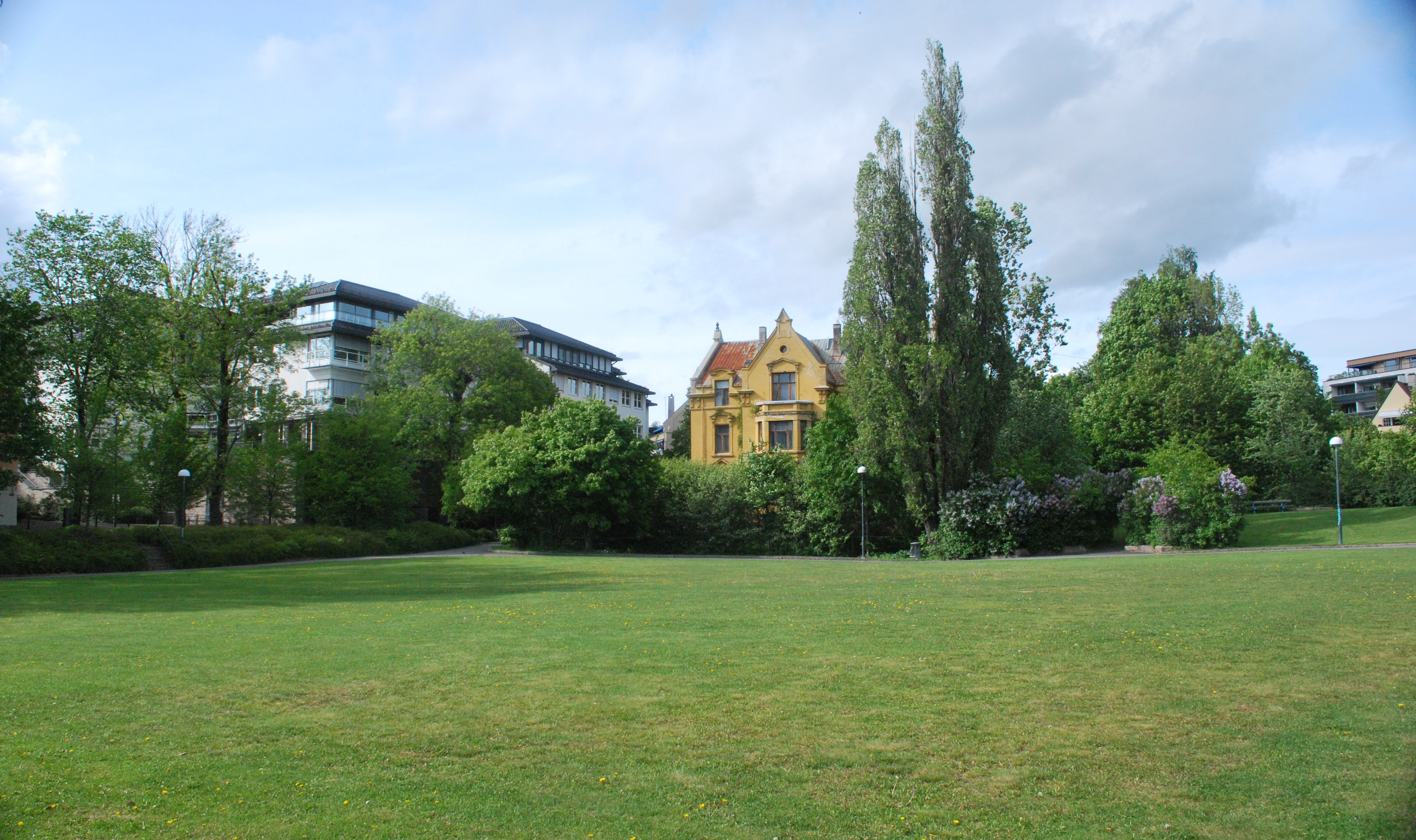 Frøyas have, Skarpsno, Oslo, parkens nordvestlige del med inngangen fra Frøyas gate